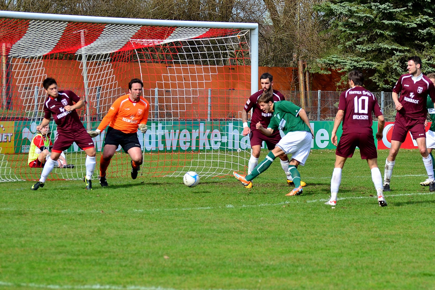 EVORA Arena, Hamm, Datum/Uhrzeit: 14.04.2013 16:26:26